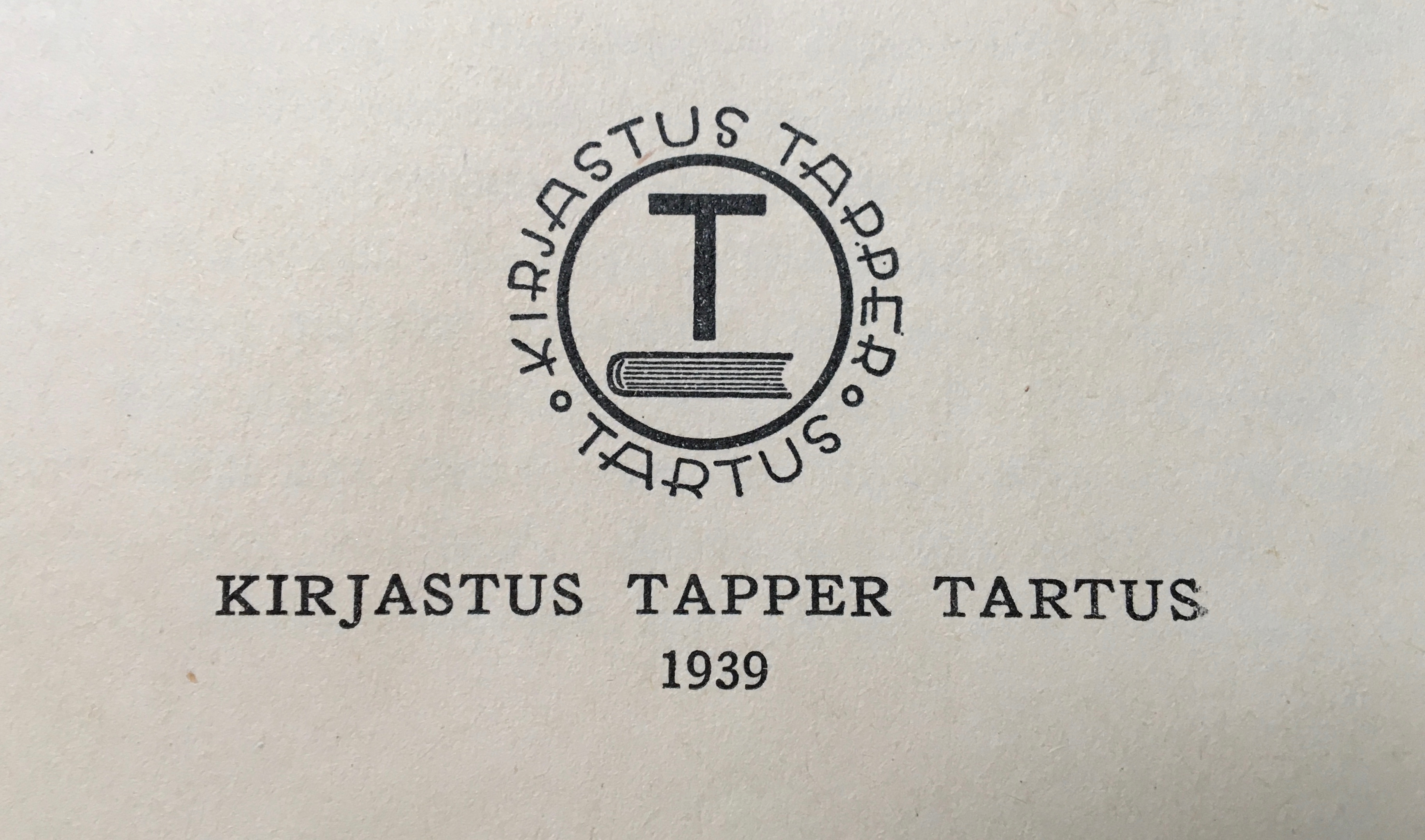 Tapper raamatus sees